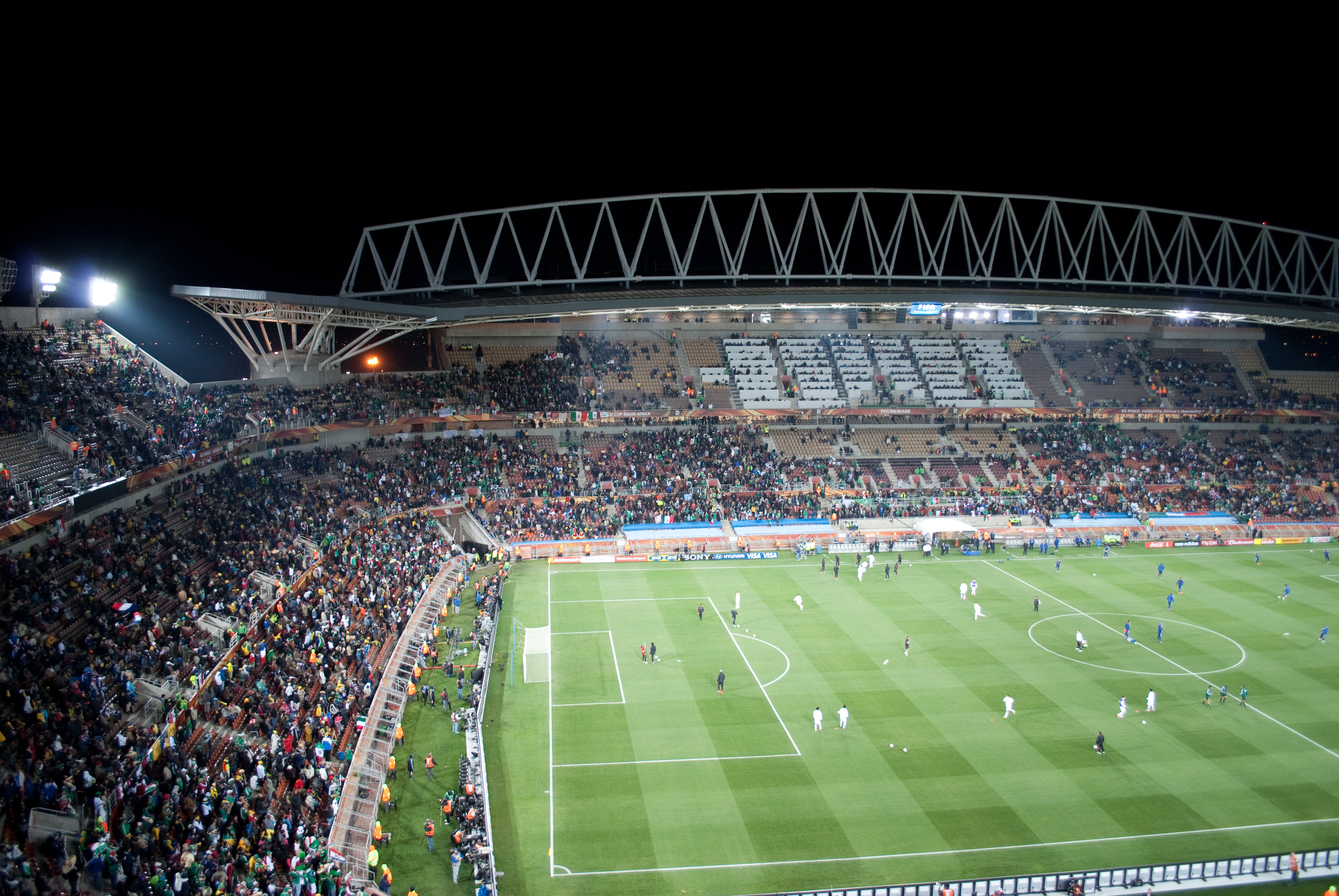 Mokaba stadium